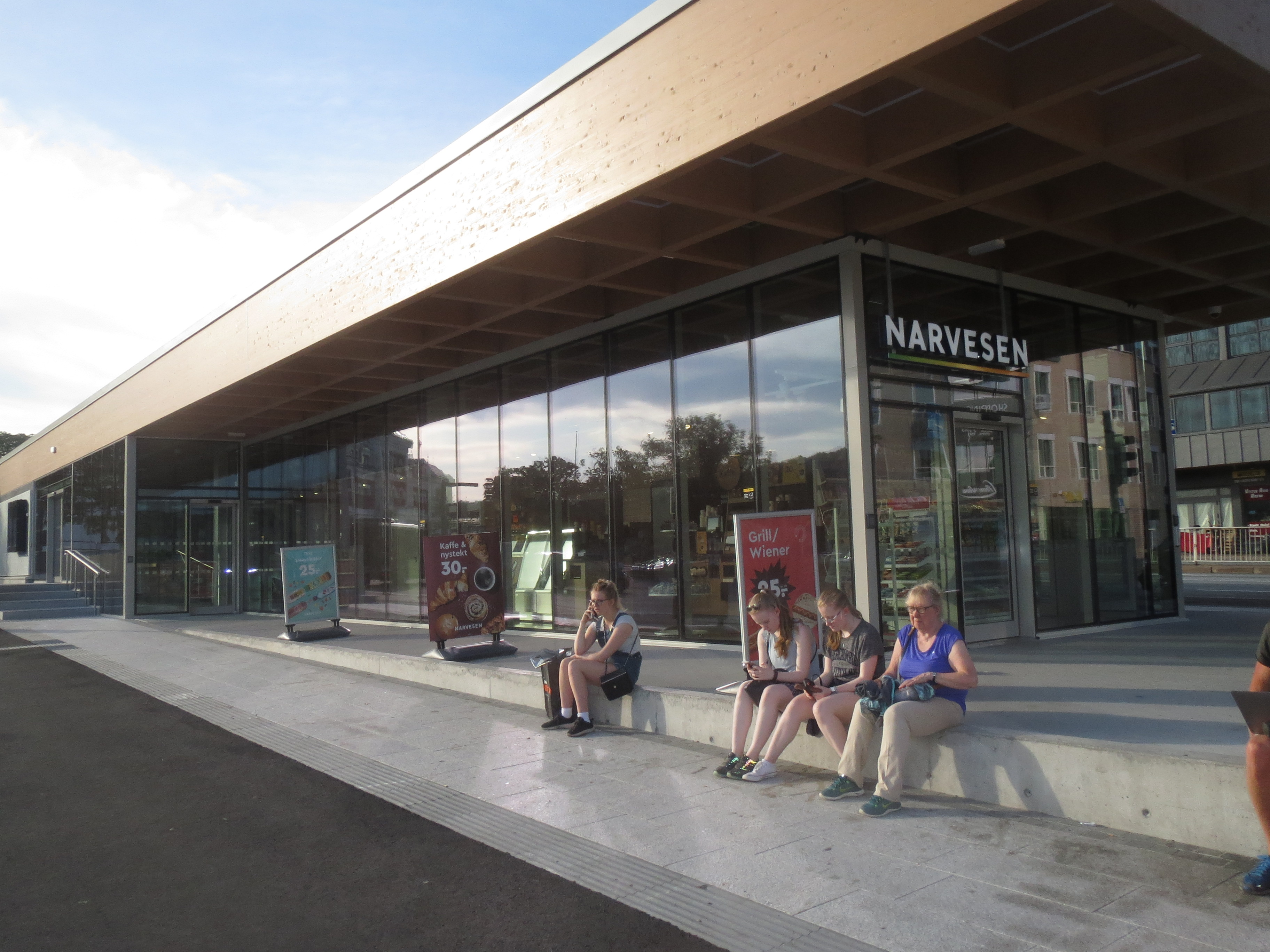 Det nye terminalbygget